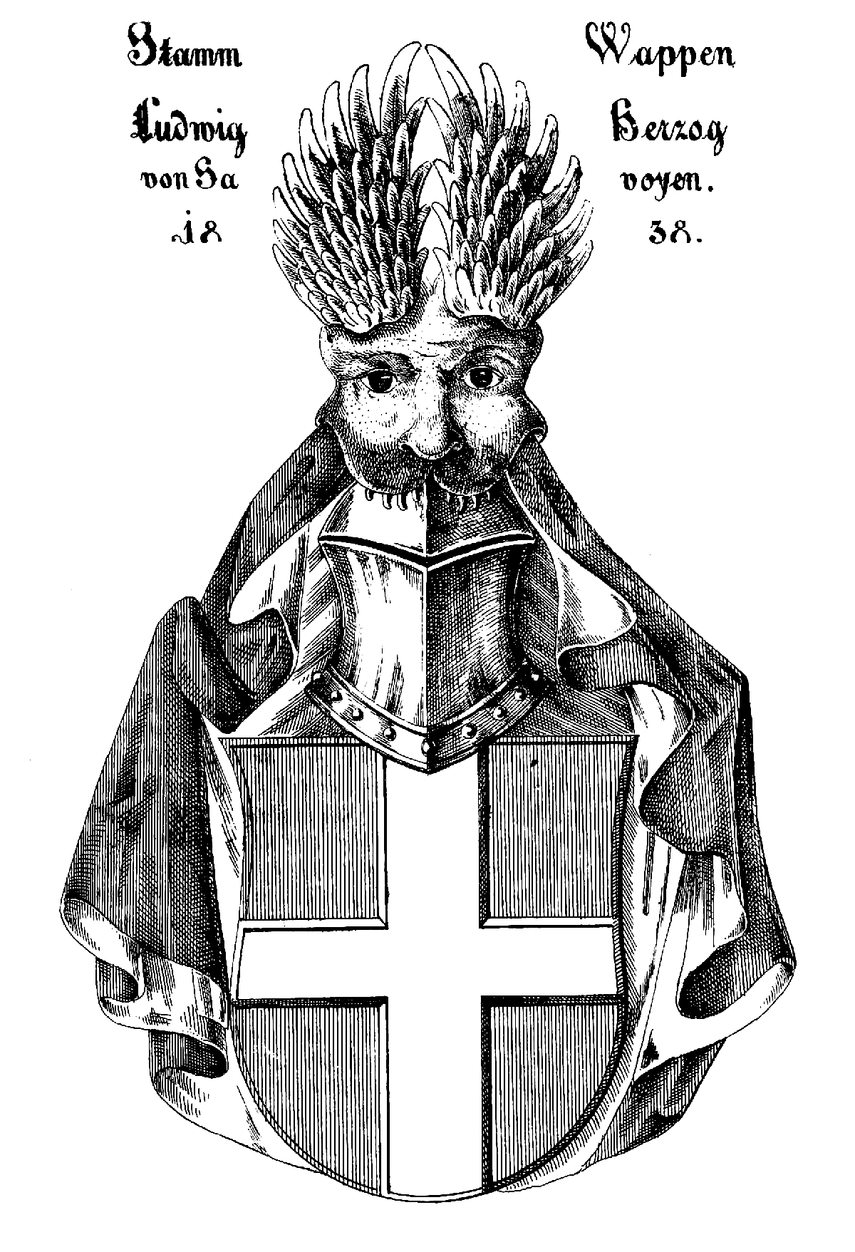 Stammwappen der Herzöge von Savoyen